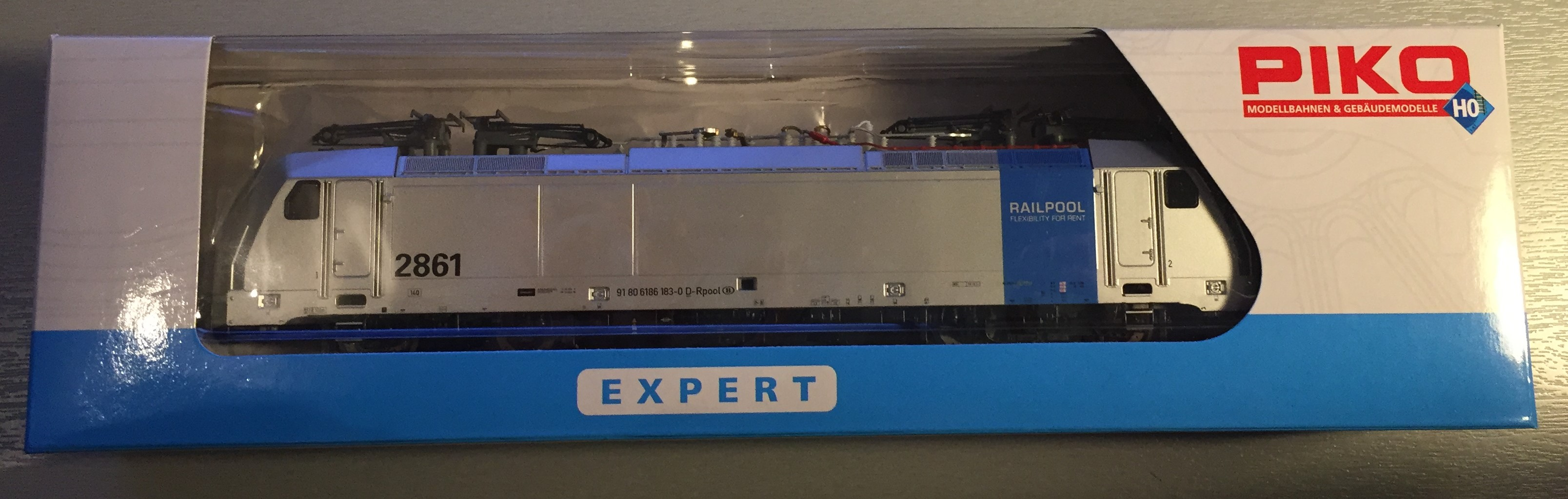 Train miniature Piko - modèle 97749 - Sncb railpool 2861 - E186183-0 - Photo Boite - Échelle HO